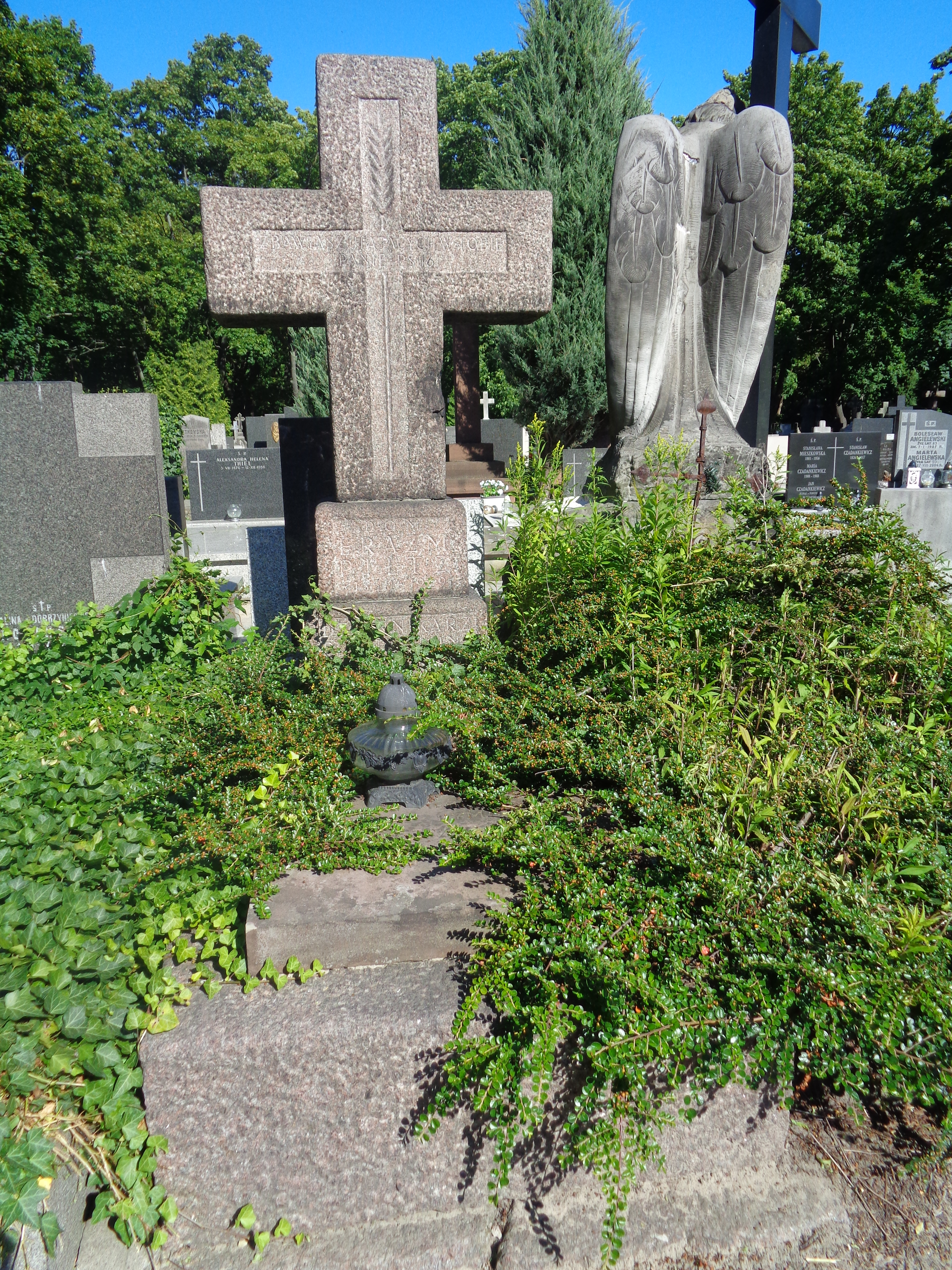 Grób Erazma Pilza na Cmentarzu Powązkowskim w Warszawie